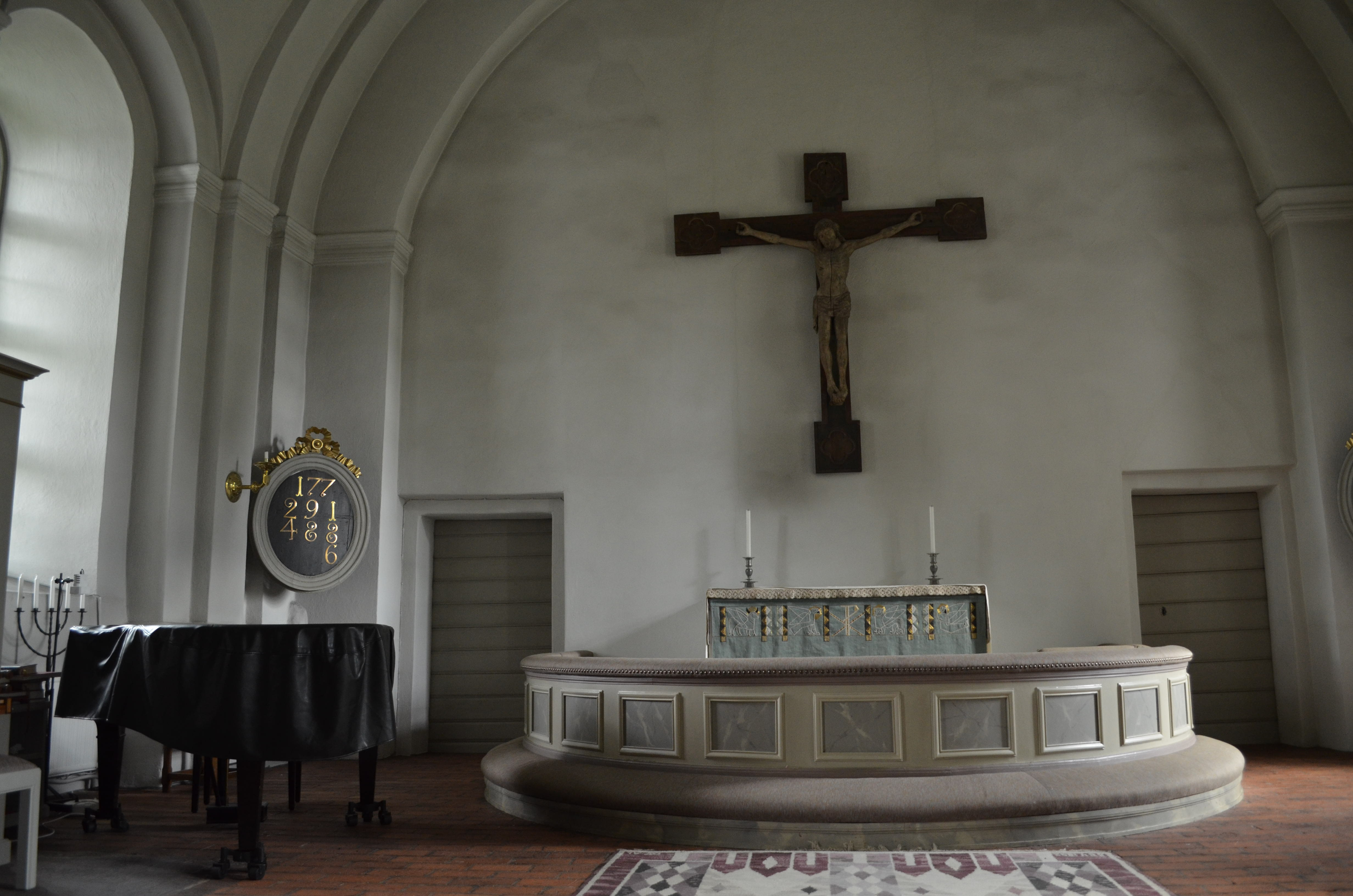 Altare